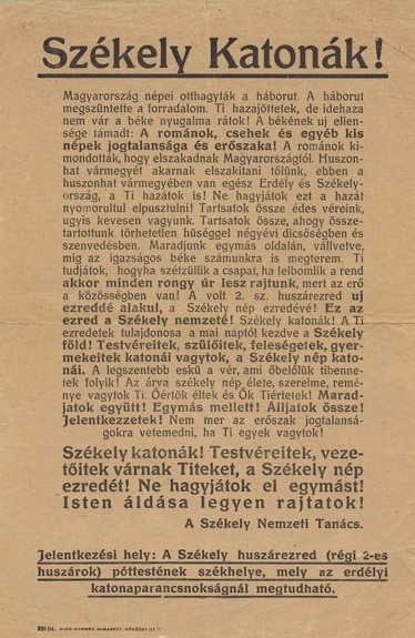 A Székely Nemzeti Tanács kiáltványa. A Székely Hadosztály felállítása. Forrás